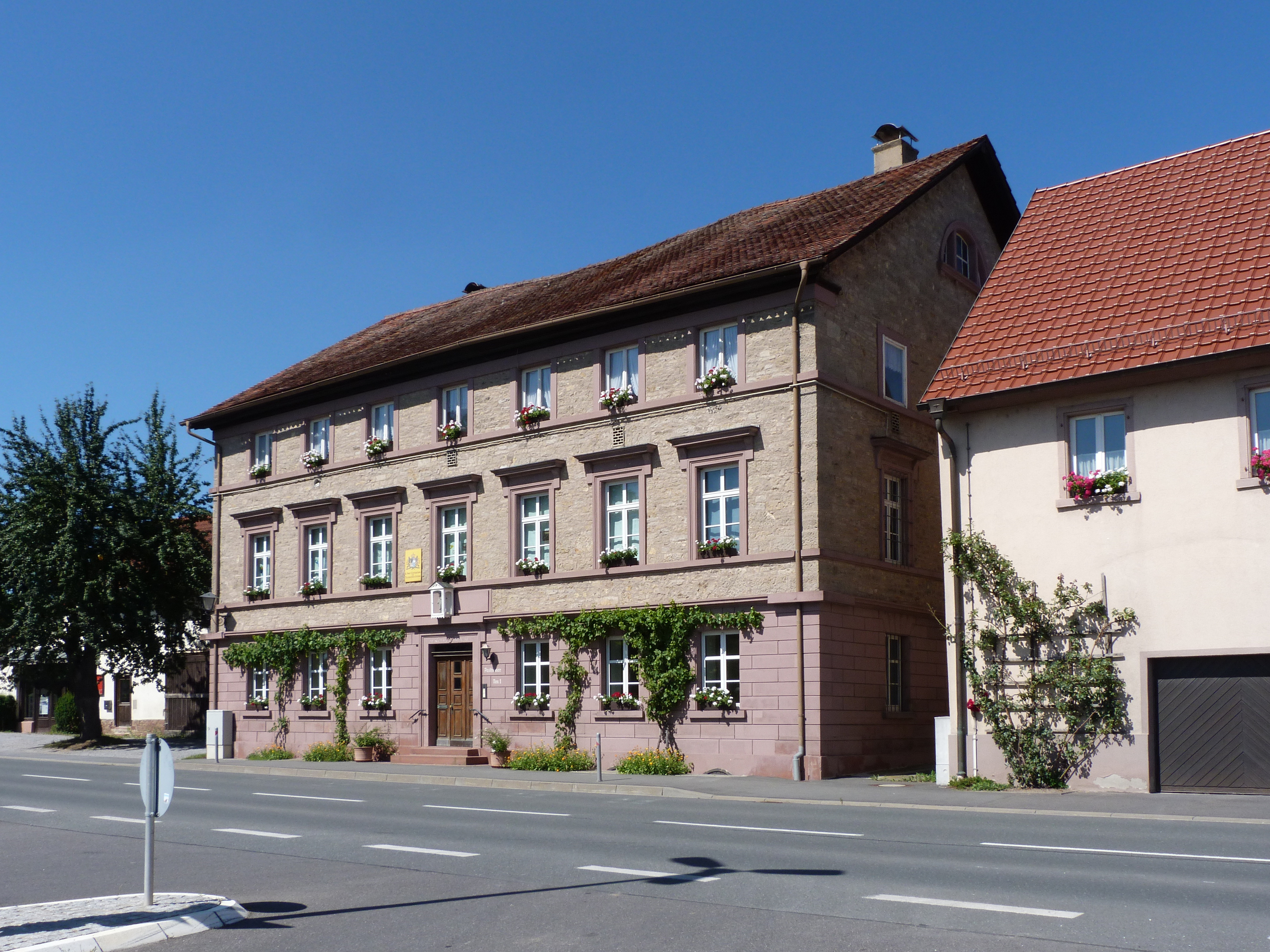 Posthäuser 1 in Rossbrunn, Unterfranken